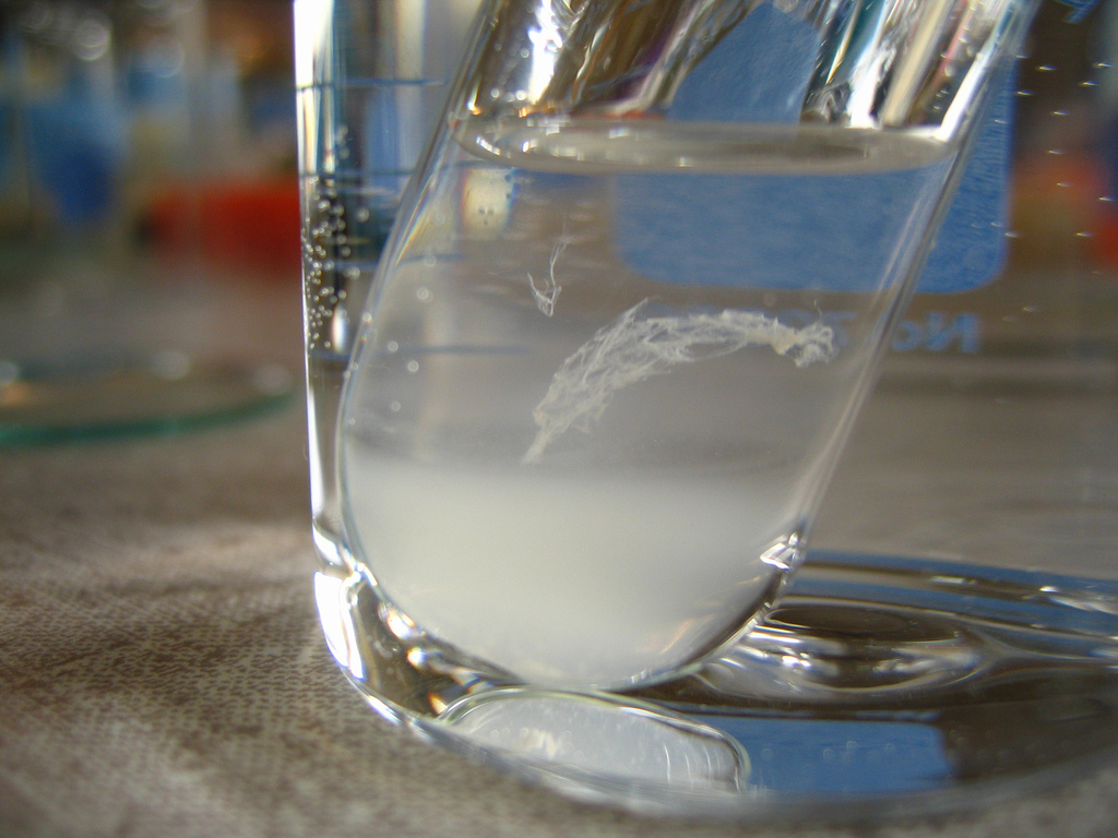 Probable Nucleic Acid precipitated.